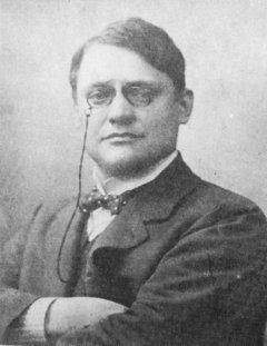 Jaroslav Pulda (1870 - 1926), Český divadelní herec a operetní režisér.